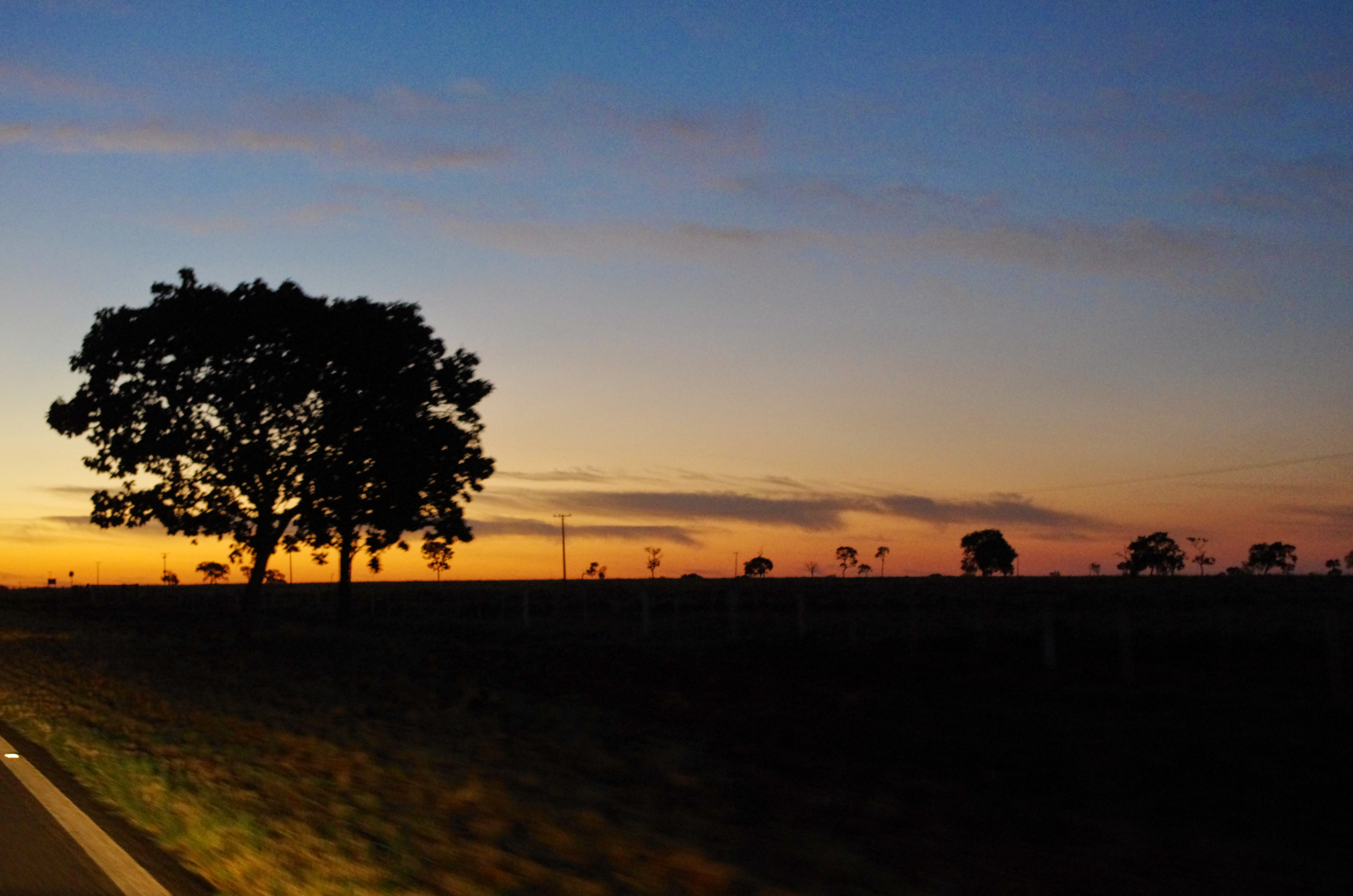 Chapadão do Sul, MS, Brazil